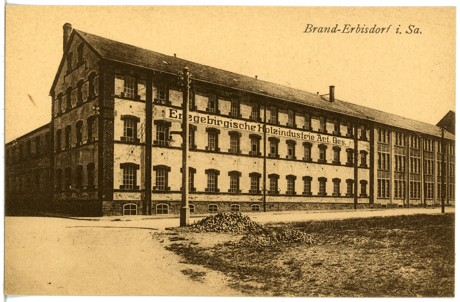 Brand-Erbisdorf; Erzgebirgische Holzindustrie-Fabrik This postcard is from publisher Brück & Sohn in Meißen ( postcard has a unique number 21864 and is available in a higher resolution at the publisher. This images was uploaded in a cooperation project between Wikipedians and the publisher.